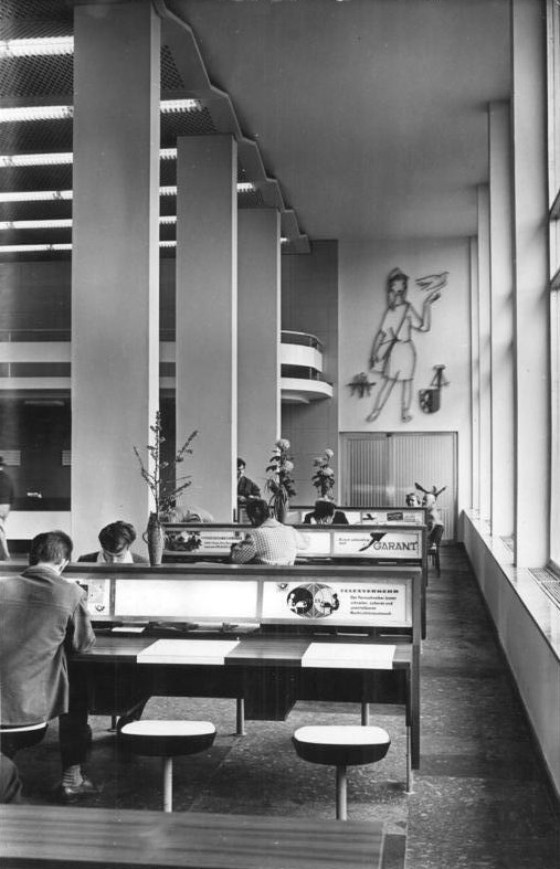 Leipzig, Hauptpost, Briefschalterhalle Zentralbild Koch-Kluge 2.9.1964 Das modernste Postgebäude der DDR ist das mit einem Kostenaufwand von 14 Millionen MDN gebaute Postamt C I in Leipzig. Das 110 Meter lange Gebäude wurde als erster Bauabschnitt einen großen Postkomplexes errichtet. Unser Foto zeigt einen Blick in die Briefschalterhalle. Die von Prof. Heller entworfene Metallbiegearbeit (im Hintergrund) stellt eine Postbotin dar.